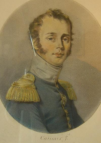 Marie Antoine de Reiset peint en 1809, par le peintre colmarien Casimir Karpf, lorsqu'il était colonel au 13° Dragons